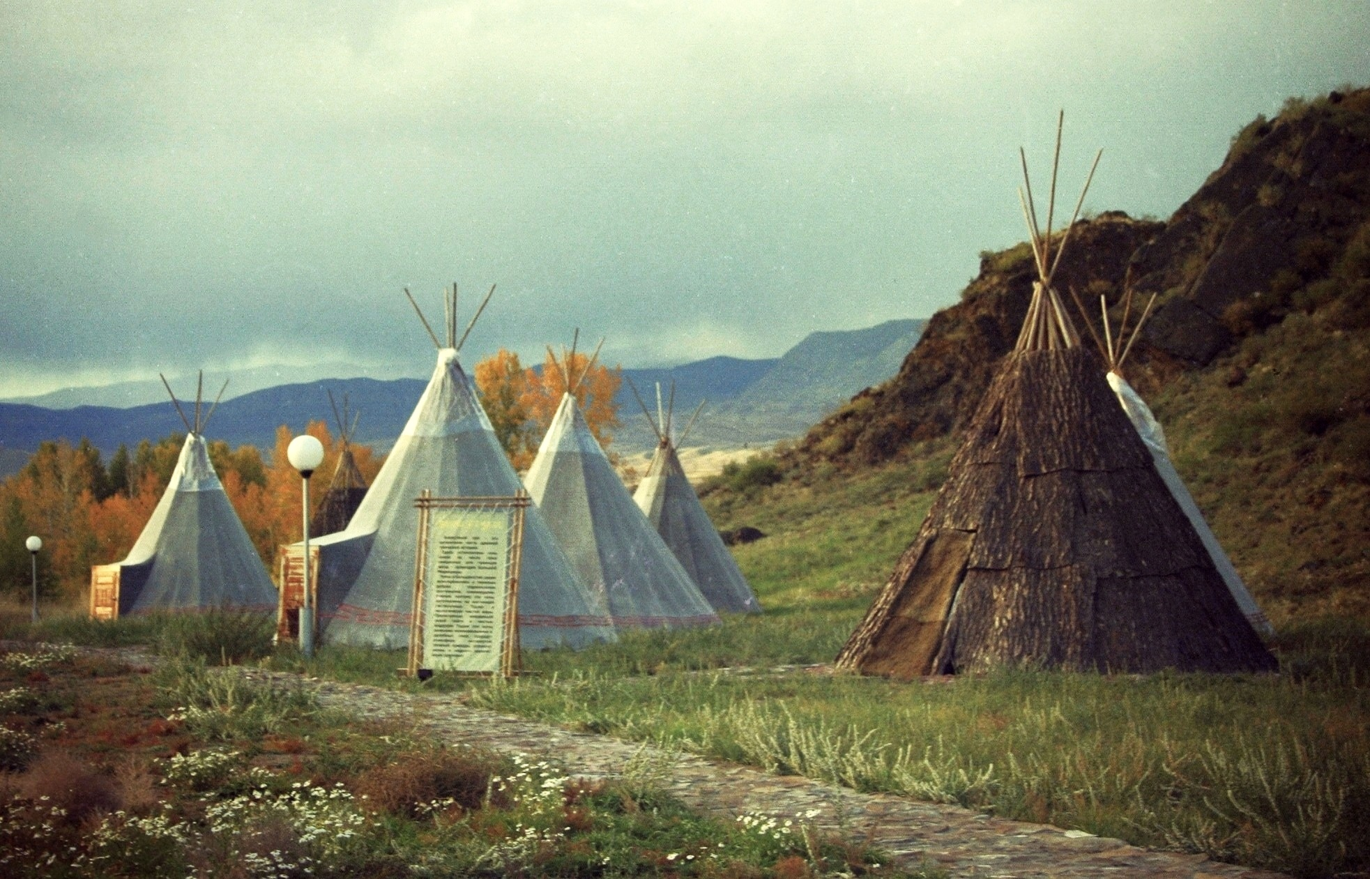 Этнокультурный комплекс "Алдын Булак"